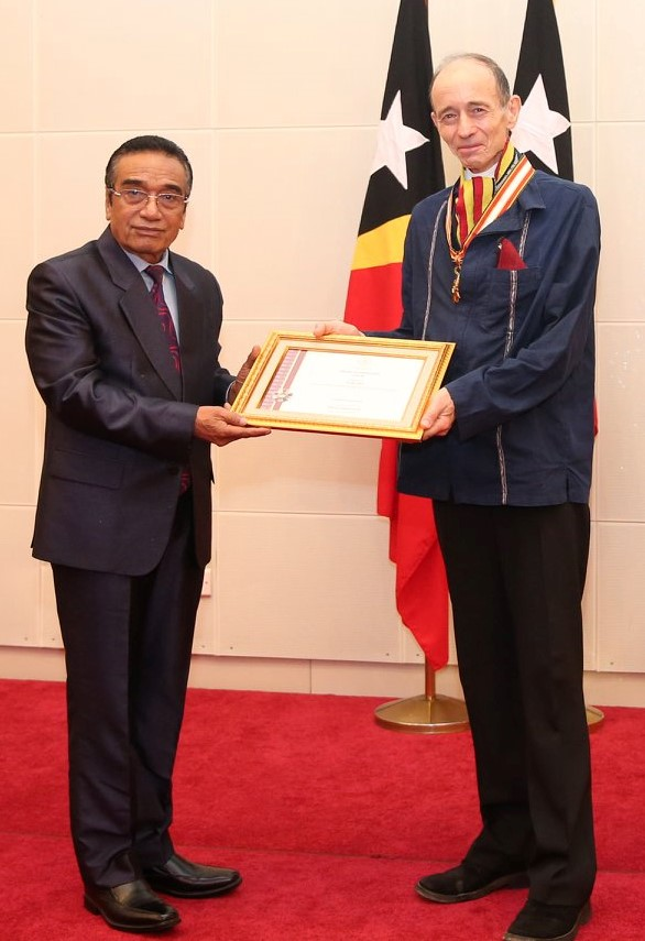 Christopher Wenner erhält von Francisco Guterres den Ordem de Timor-Leste